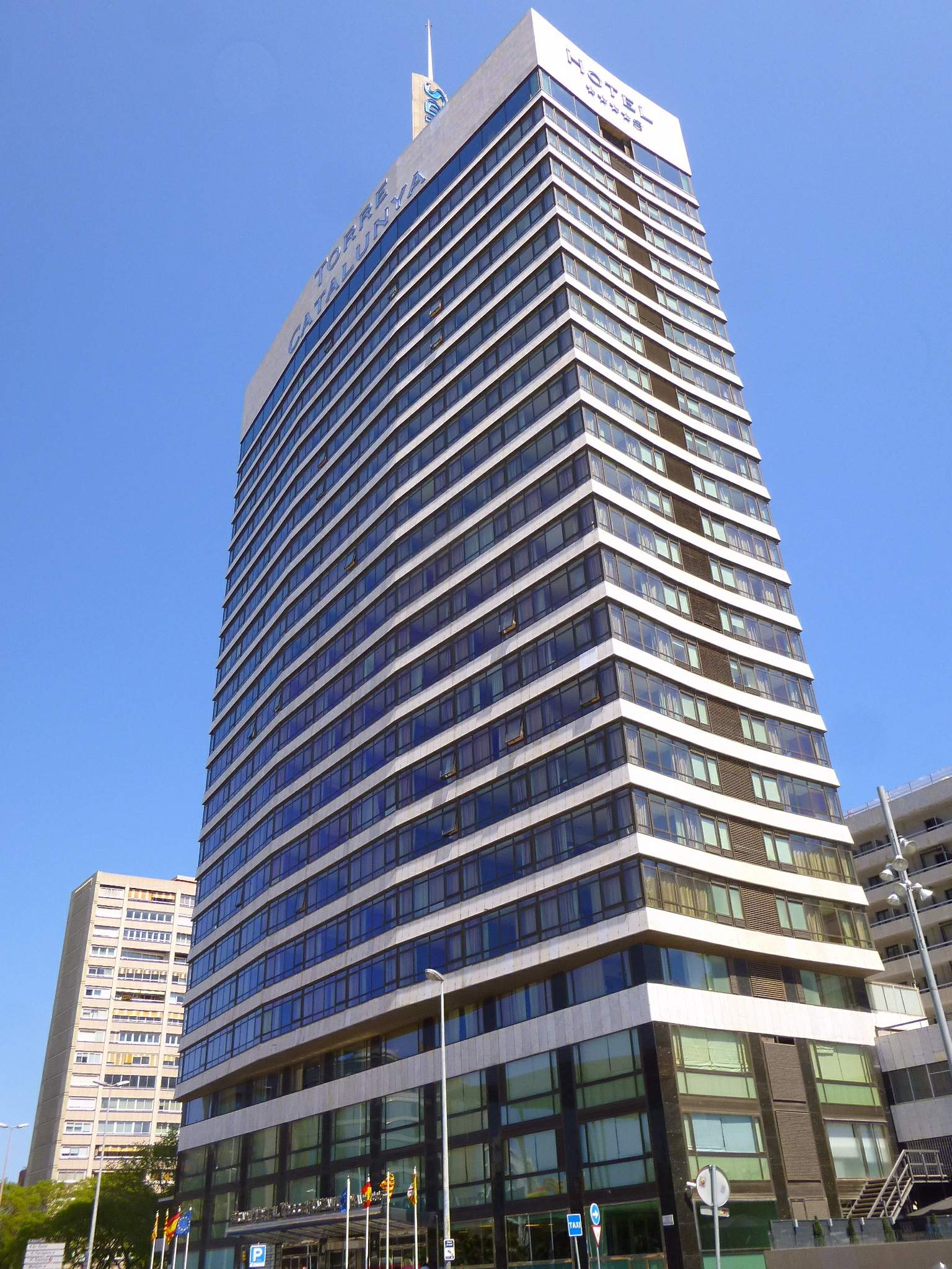 Barcelona - Gran Hotel Torre Catalunya